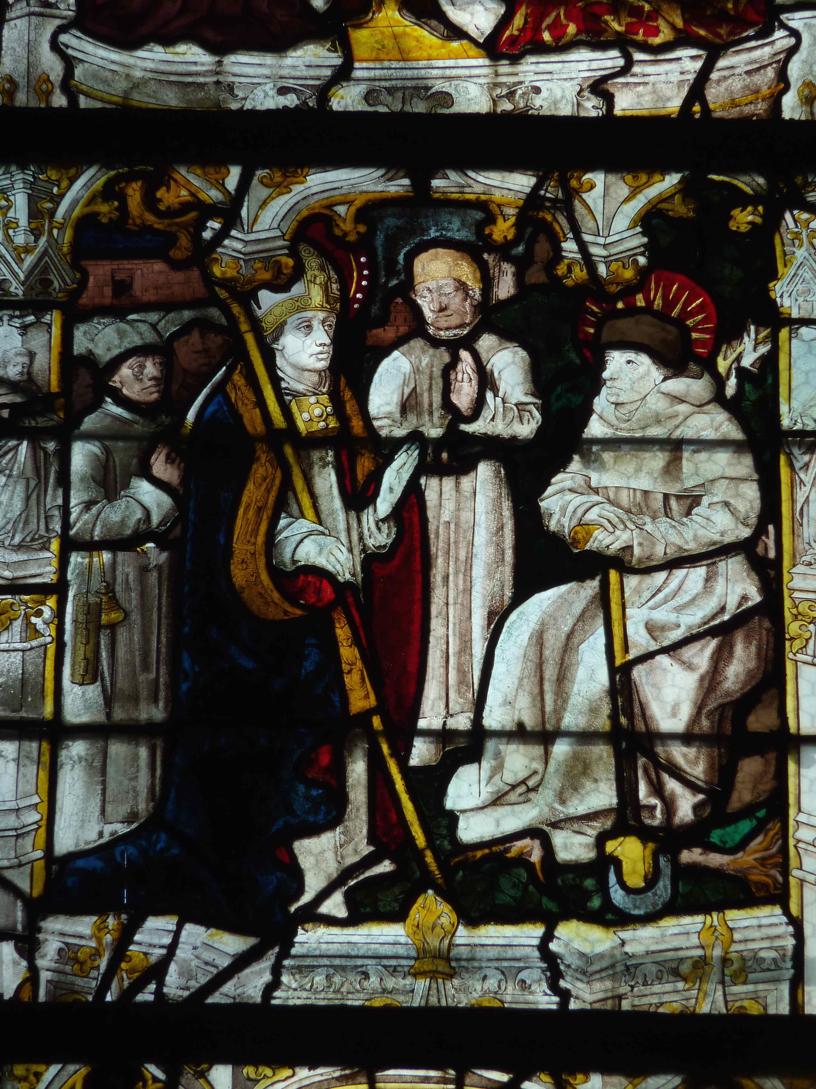 Katholische Kirche Saint-Pierre in Dreux im Département Eure-et-Loir (Centre-Val de Loire/Frankreich), Bleiglasfenster (baie 6) aus dem frühen 16. Jahrhundert; Darstellung: Legende des hl. Fiacrius